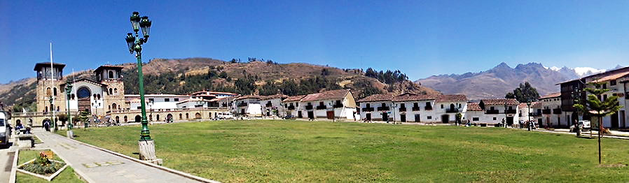 Vista panorámica del lado oeste de la Plaza Mayor de Chacas